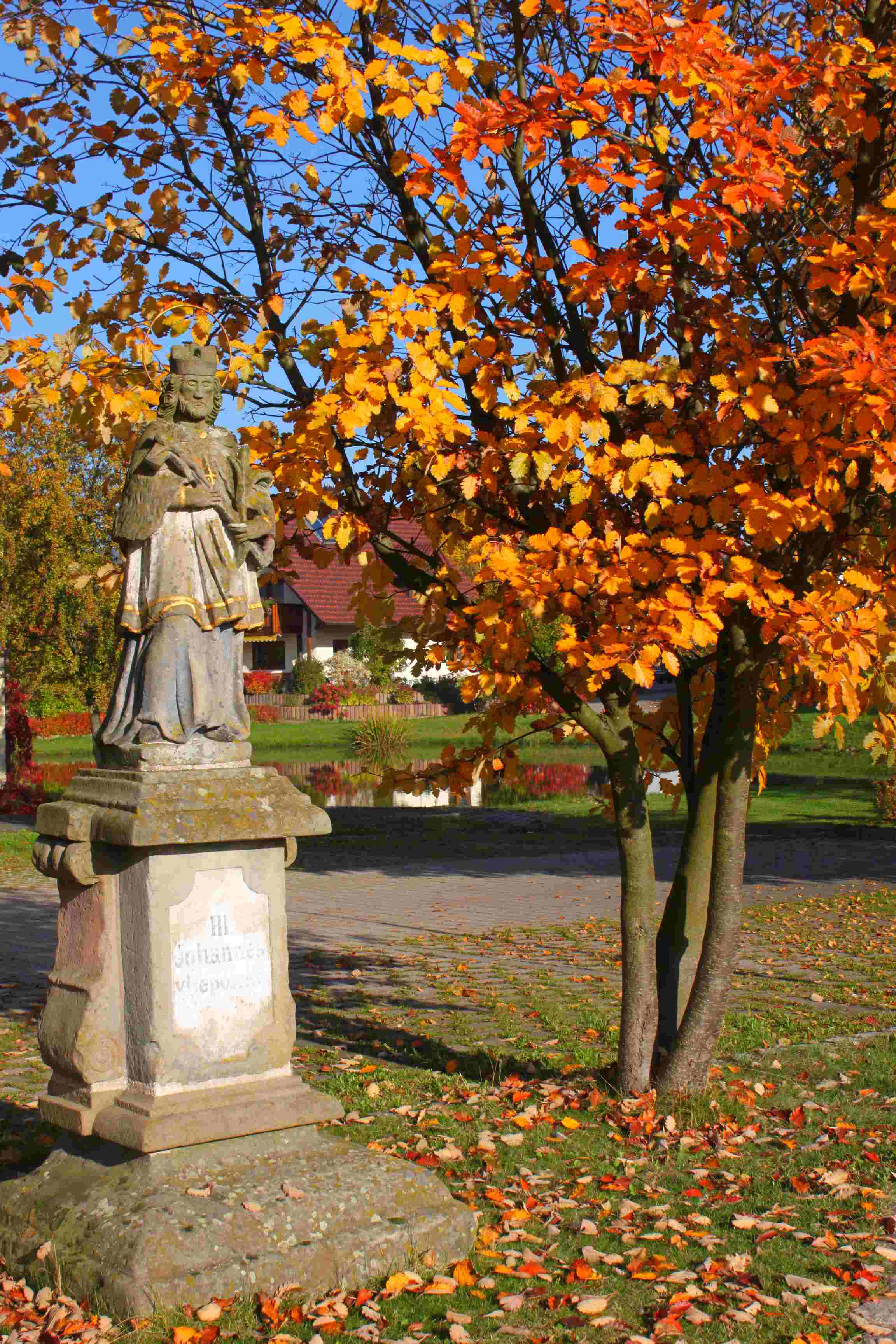 Heiliger Johann Nepomuk beim Feuerwehrhaus in Kirchenpingarten. Barocke Sandsteinfigur auf Volutensockel, erste Hälfte 18. Jahrhundert